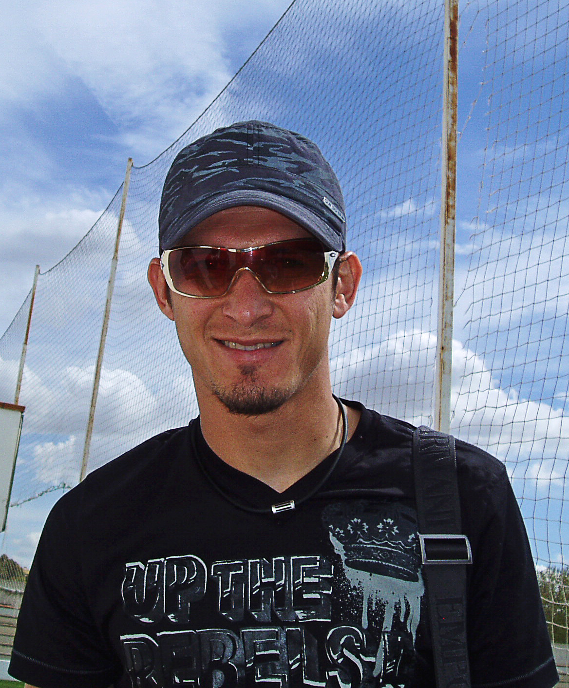 El jugador Luis Eduardo Schmidt, "Edu", a la salida de los entrenamientos